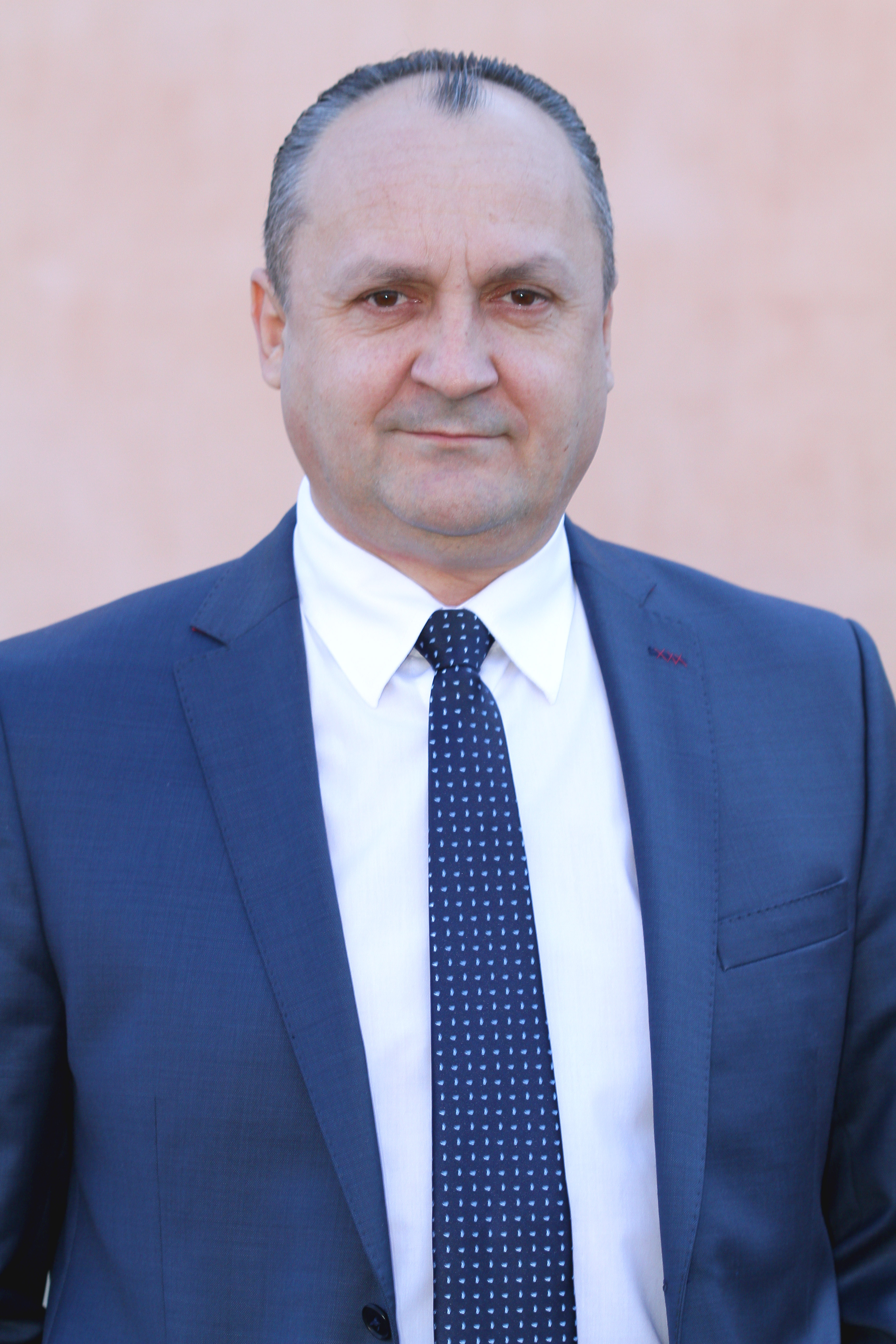 Фотографија са фото сесије рађене за пропагадне сврхе и то израду календара и фотографија за медије